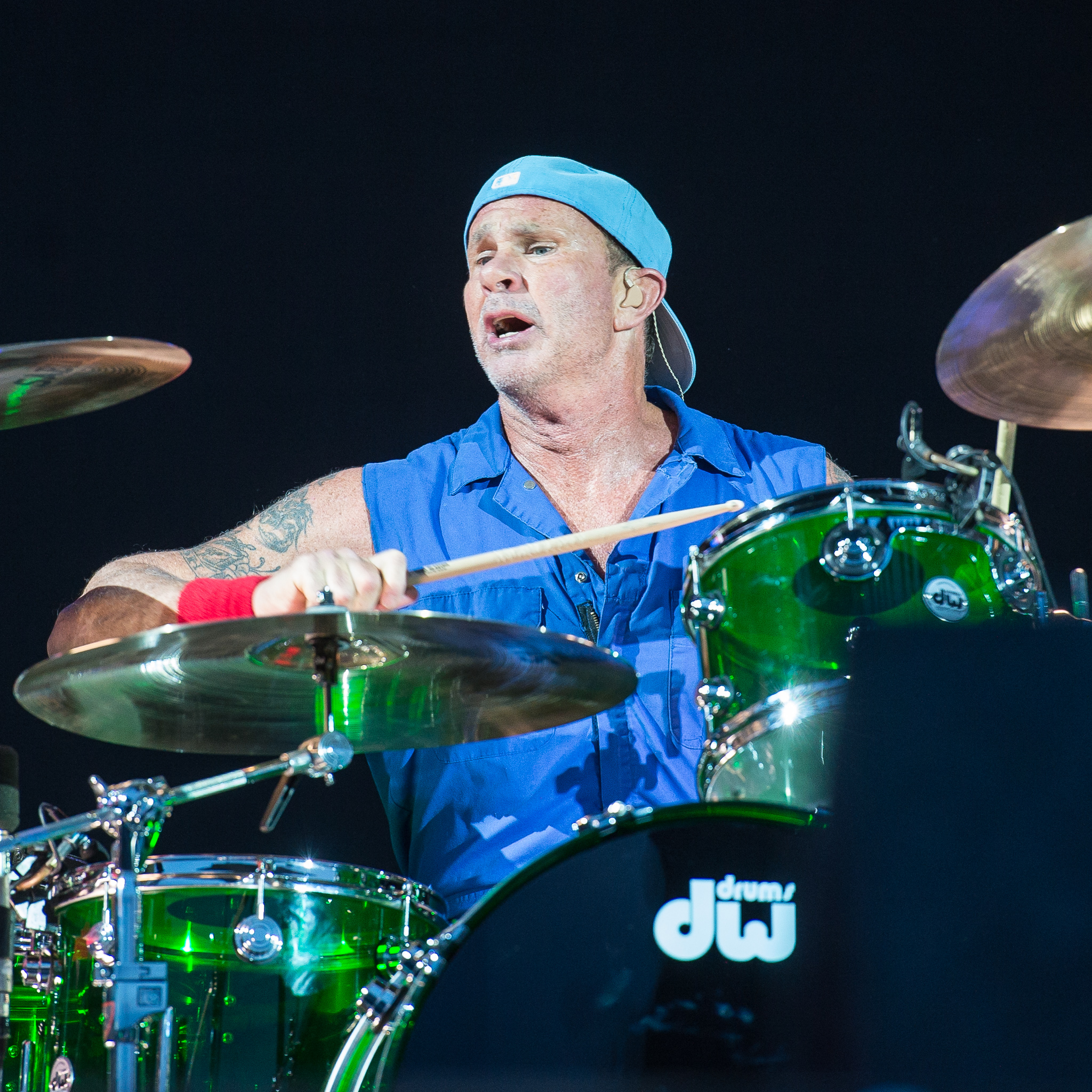 ARGO-Konzerte,Chad Smith,Festival,Konzert,Livekonzert,Livemusik,Musik,Red Hot Chili Peppers,RiP,Rock im Park 2016,Seat Zeppelin Stage